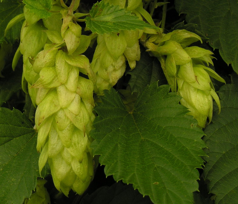 Paprastojo apynio (Humulus lupulus) vaisiai - riešutėliai, sutelkti kankorėžio formos varpose. Foto: Algirdas, 2006 m. rugpjūčio 24 d., Lietuva